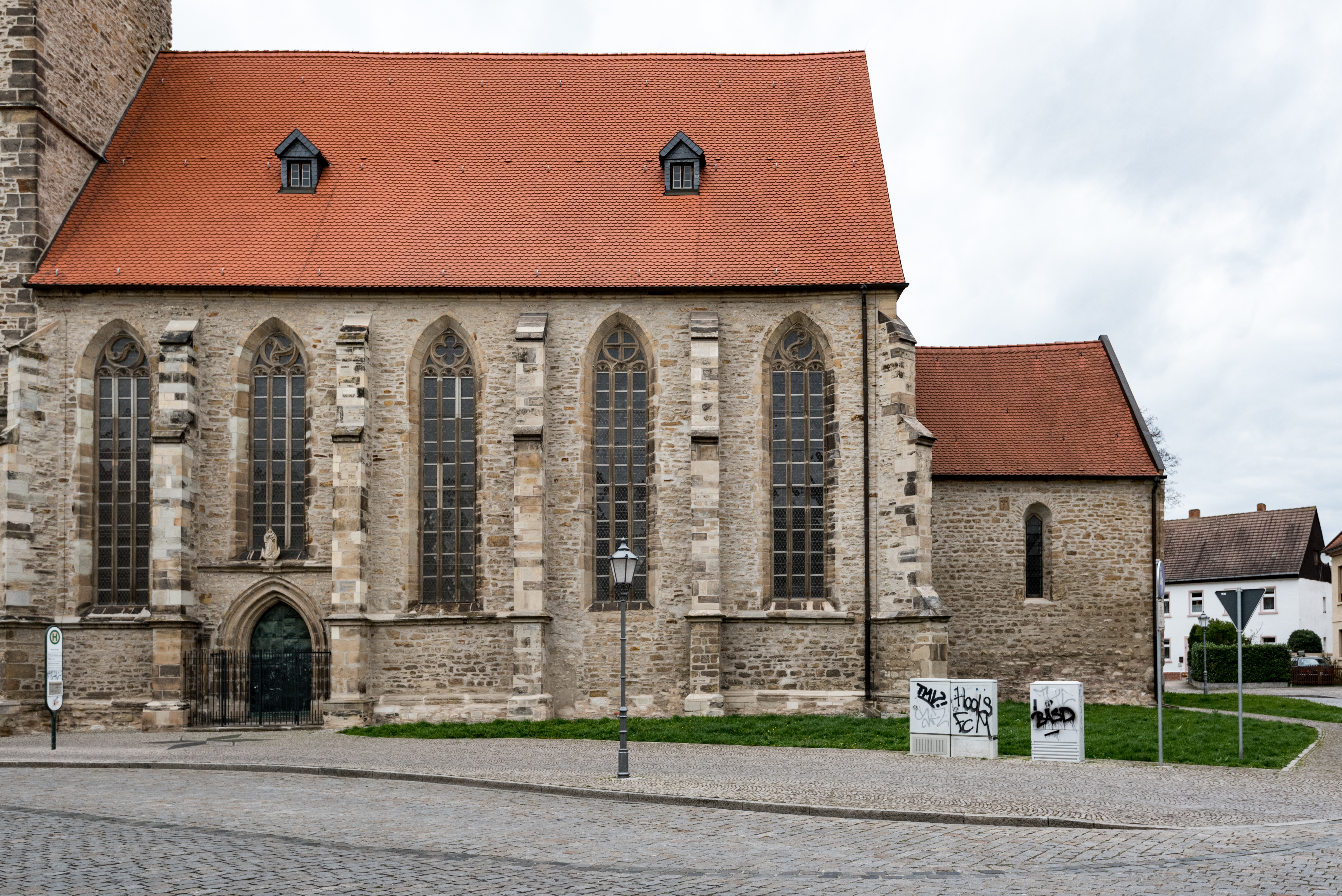 Bernburg (Saale), St. Nikolai